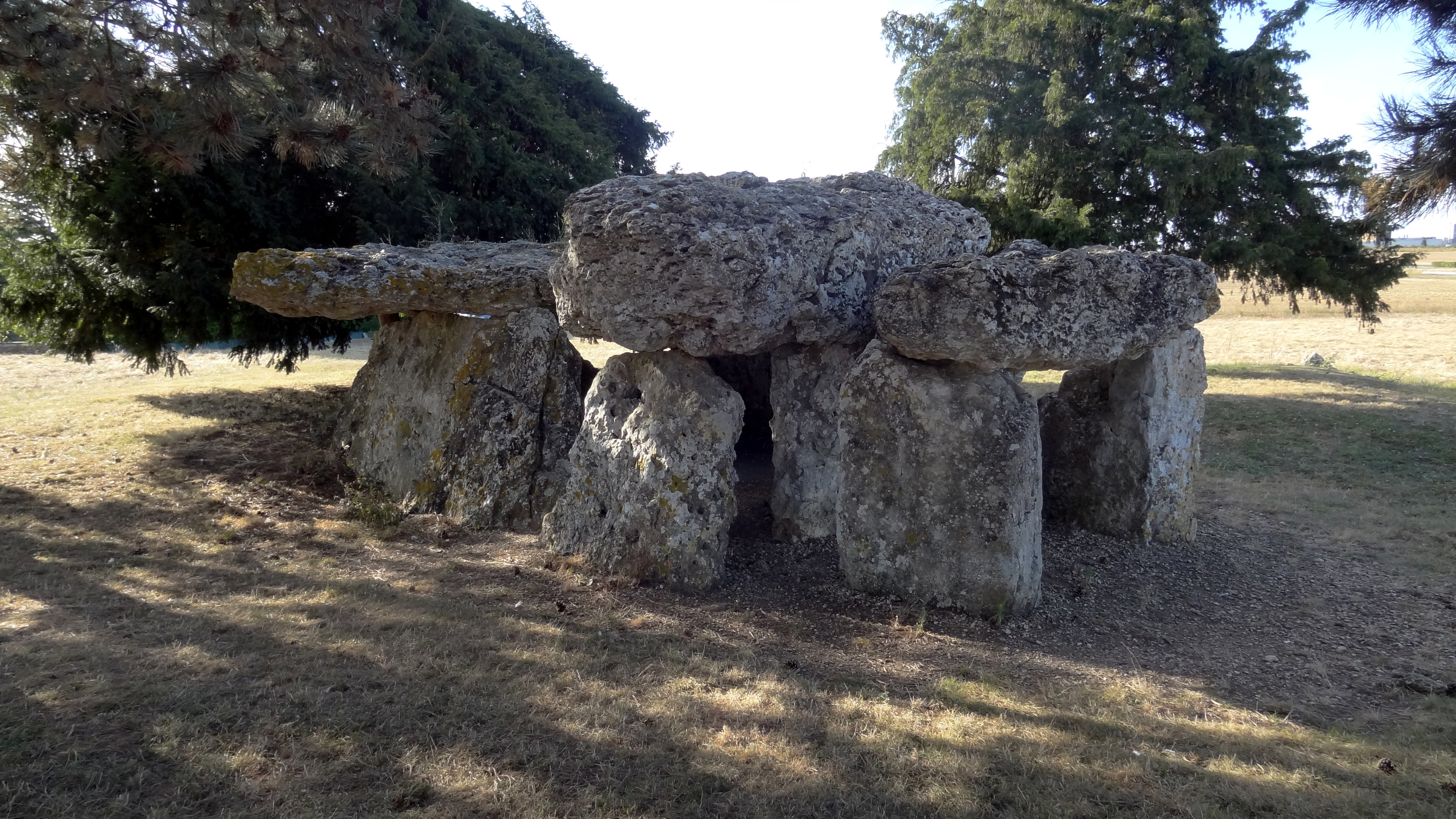 Dolmen de la Pierre Levée, La Chapelle-Vendômoise, Loir-et-Cher, France. .